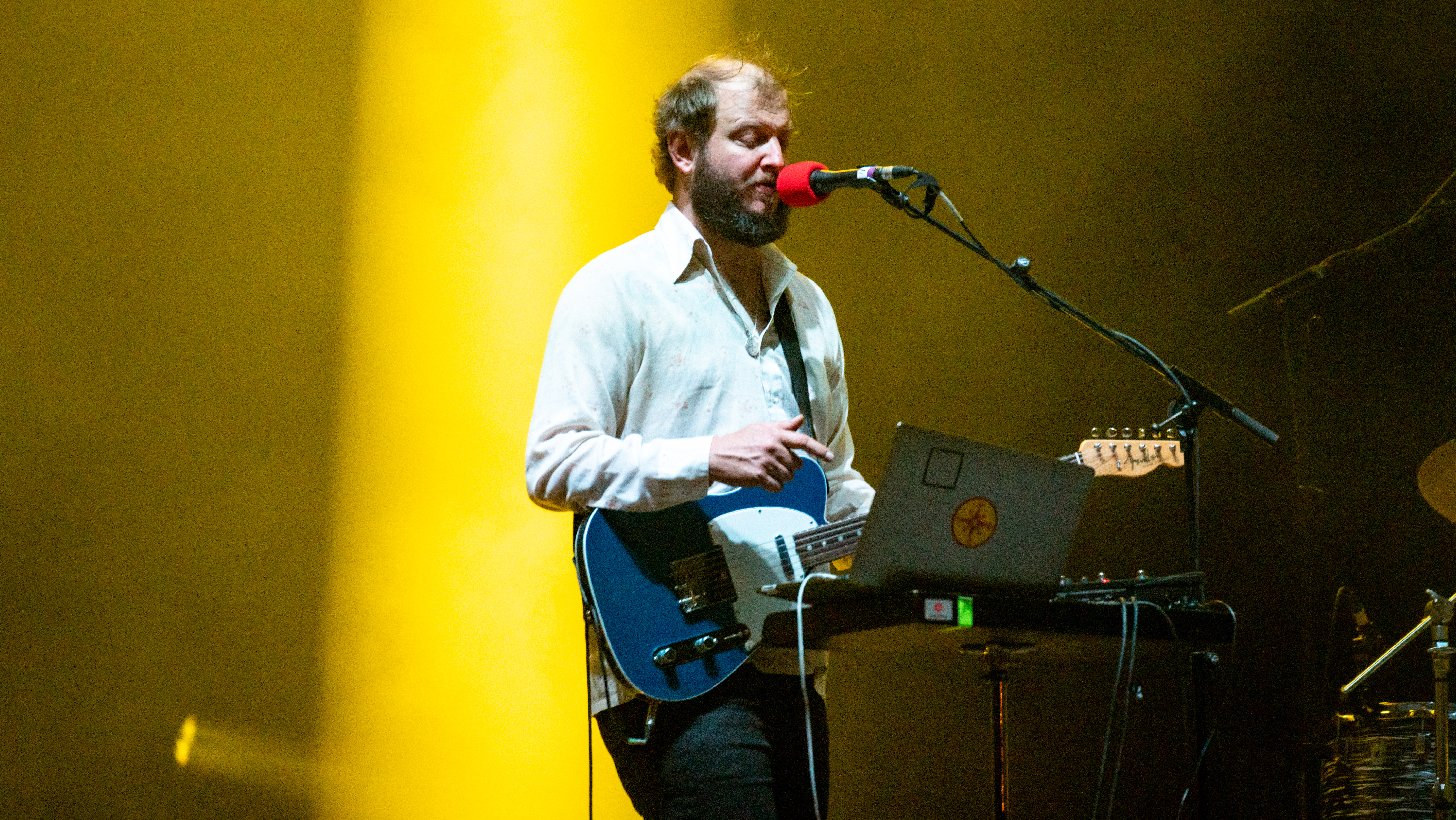 Primavera19_-14